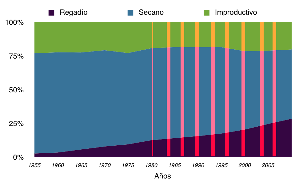 Evolución de los cultivos superpuesta a las plagas de Microtus arvalis asturianus en Castilla y León Fuente: Cámaras agrarias locales de Medina del campo y su tierra (provincia de Valladolid), España